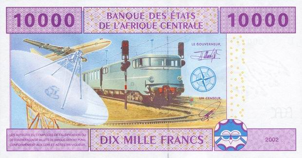 Купюра в 10000 франков КФА. Обратная сторона